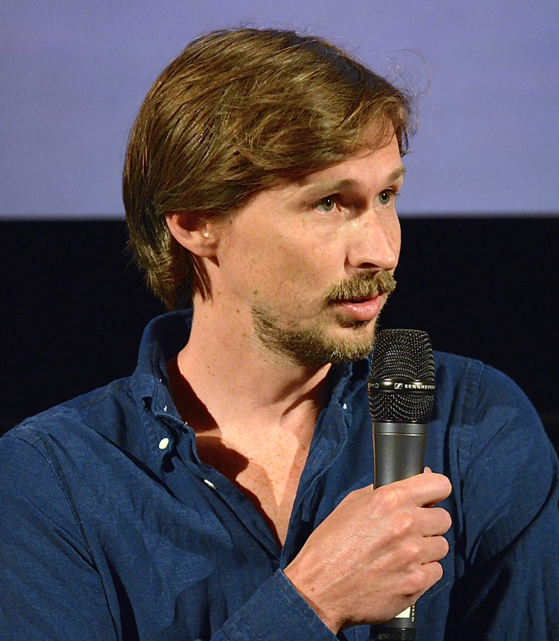 Gustaf Åkerblom under presentationen av den Svenska filmhösten 2014 i Filmhuset i Stockholm den 18 augusti 2014.